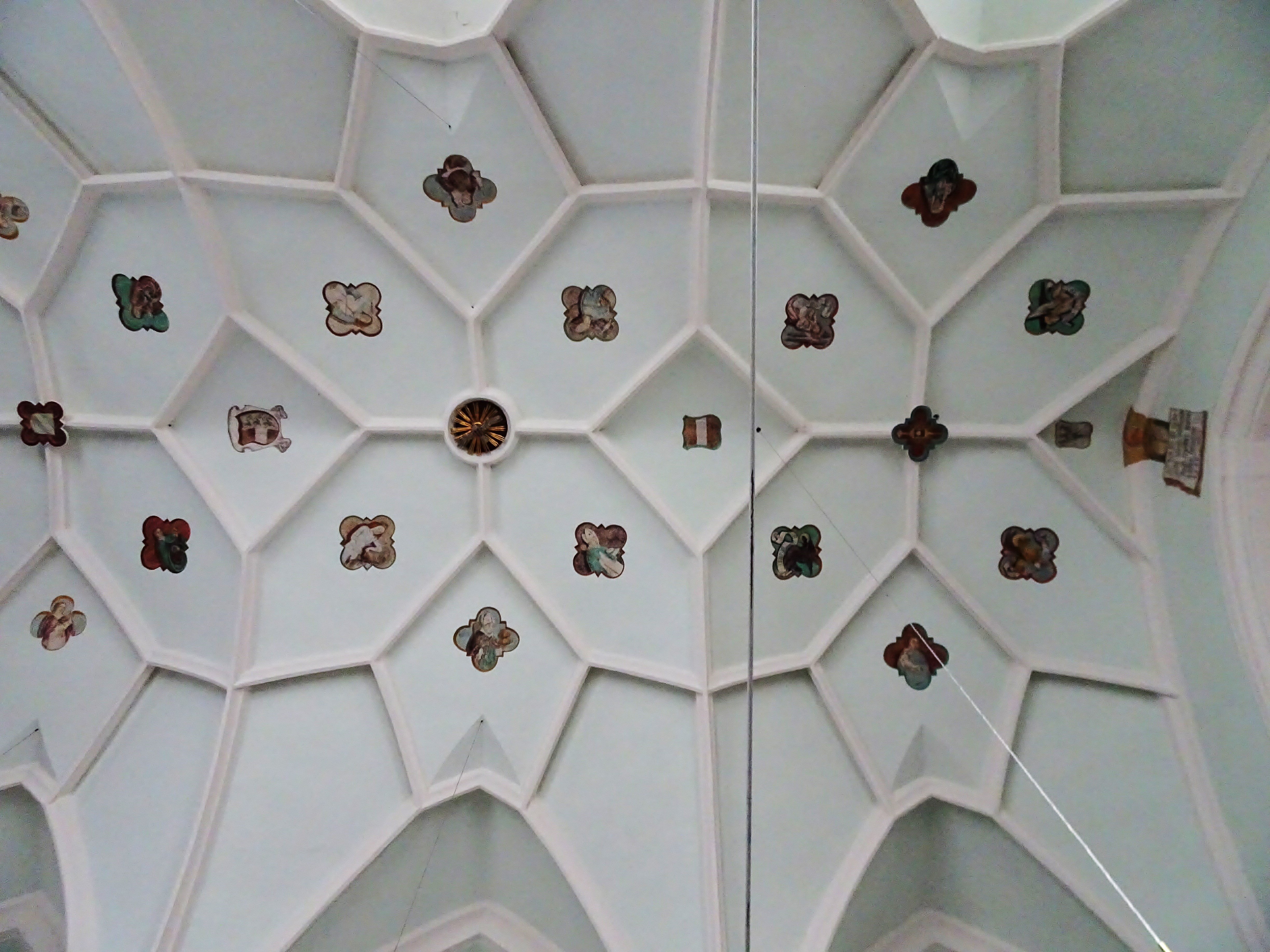 Kath. Filialkirche Maria Tax (Stallhofen), das Langhausgewölbe